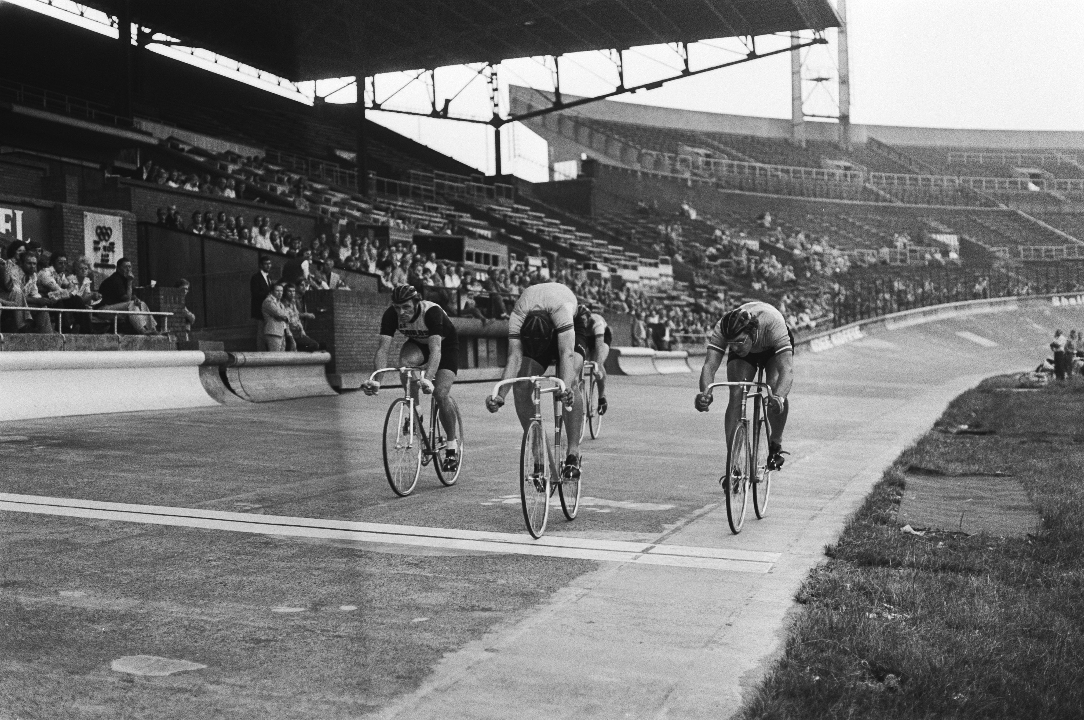 Collectie / Archief : Fotocollectie Anefo Reportage / Serie : [ onbekend ] Beschrijving : Internationale wielerwedstrijden OS in Adam, Pieters (m) wint zijn serie voor Ten Tij (r) en de Australier Clark (l), sprintersprijs Datum : 23 juni 1976 Locatie : Amsterdam, Noord-Holland Trefwoorden : stadions, wielrennen Persoonsnaam : Clark Fotograaf : Verhoeff, Bert / Anefo Auteursrechthebbende : Nationaal Archief Materiaalsoort : Negatief (zwart/wit) Nummer archiefinventaris : bekijk toegang 2.24.01.05 Bestanddeelnummer : 928-6610